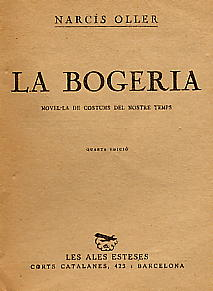 Portada de la 4a. edició de La Bogeria. (1929)